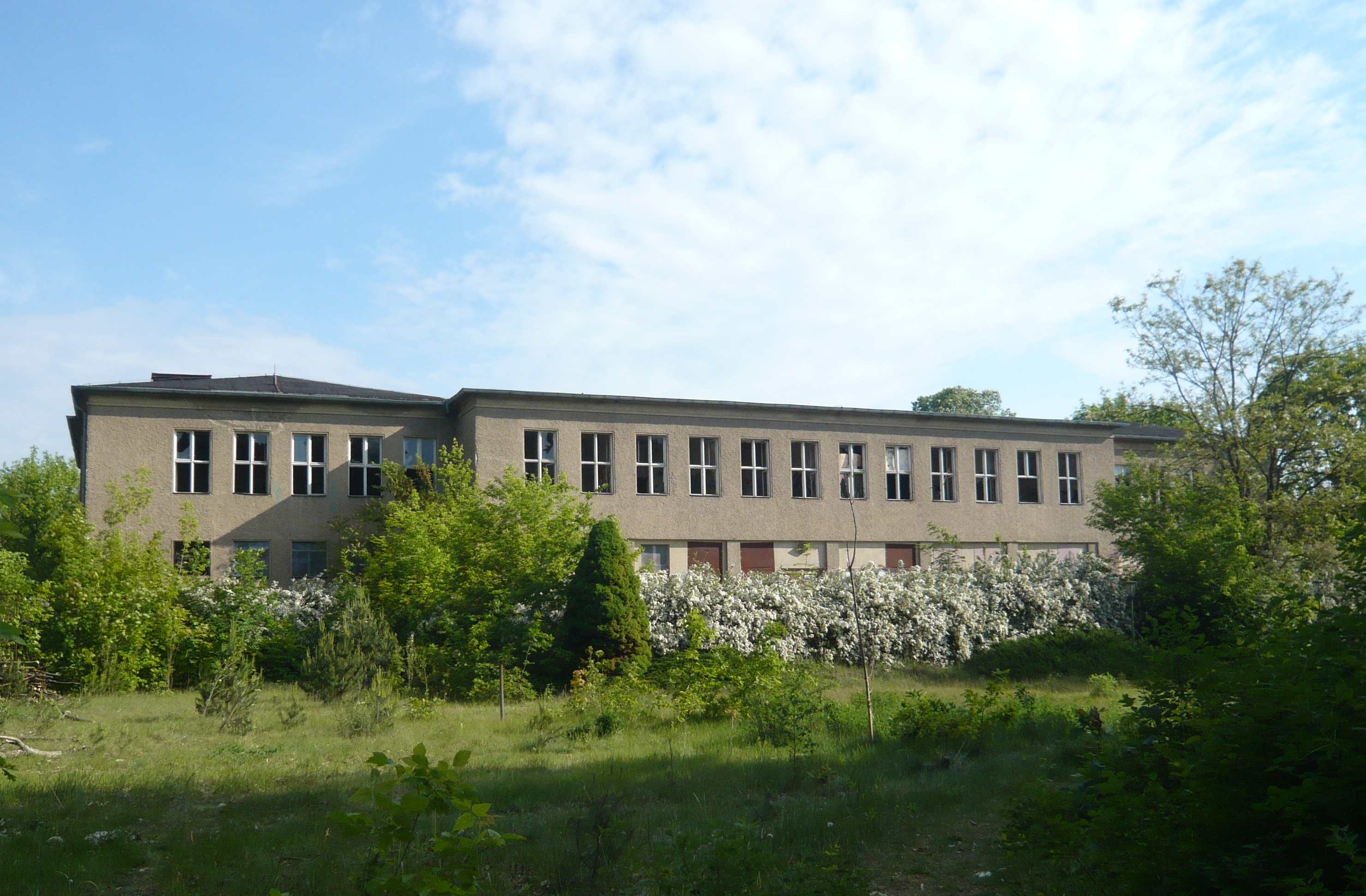 ehemaliges KWO-Kulturhaus neben der Wilhelm-Spindler-Brücke (Nordufer)